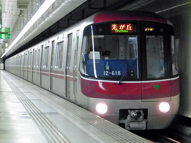 東京都交通局12-600形 光が丘駅にて撮影